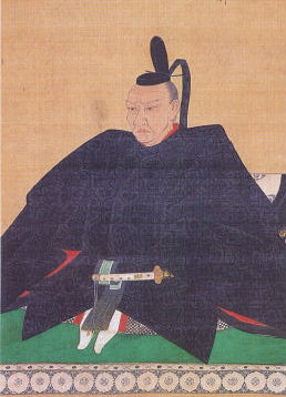 松平昌親/吉品の肖像。